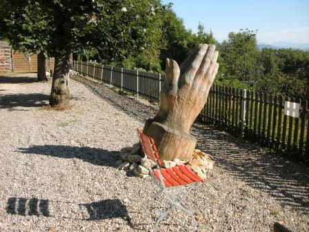 Centre de formation et de rencontre Bienenberg